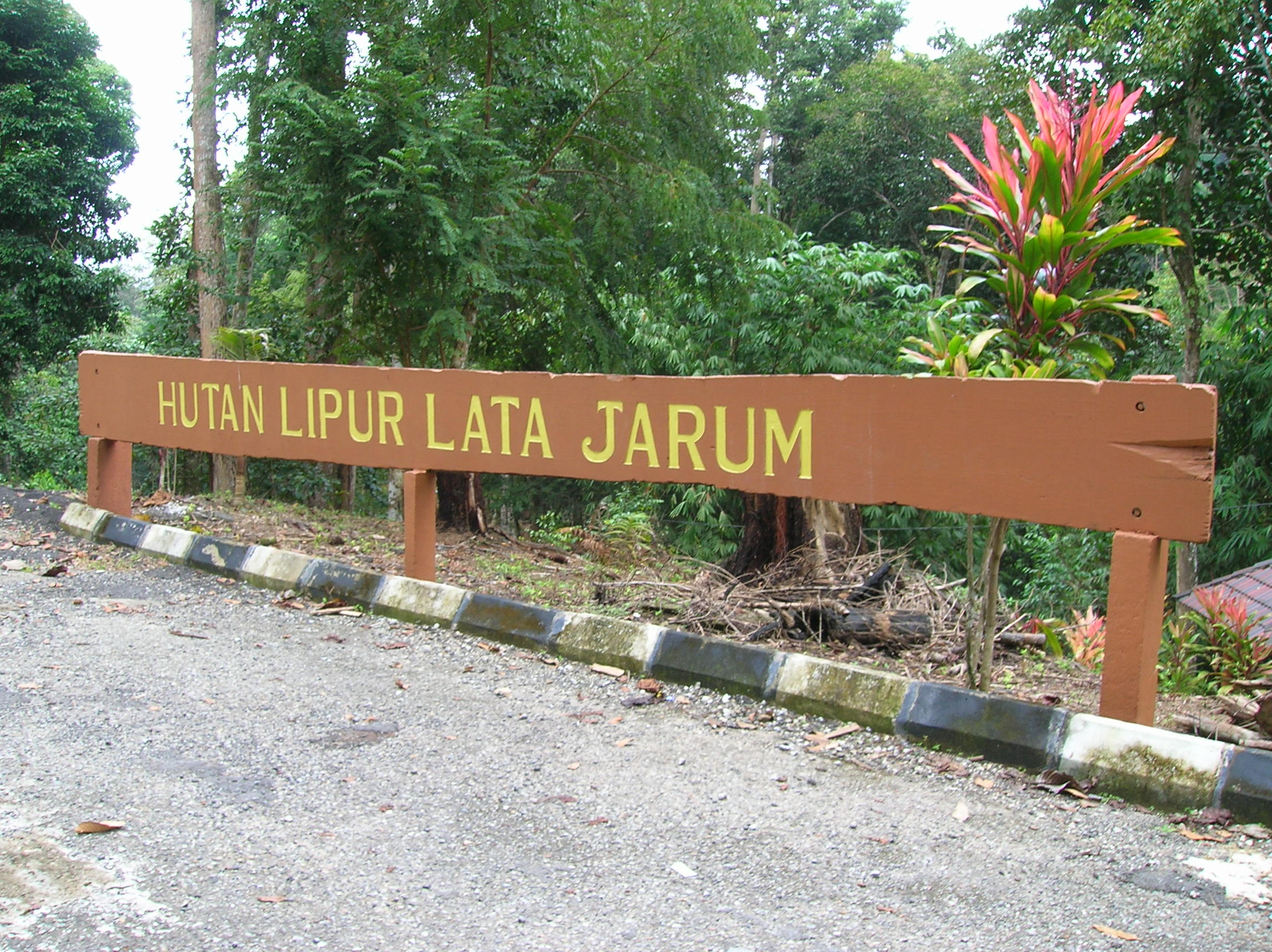 berhampiran ialah air terjun Lata Jarum